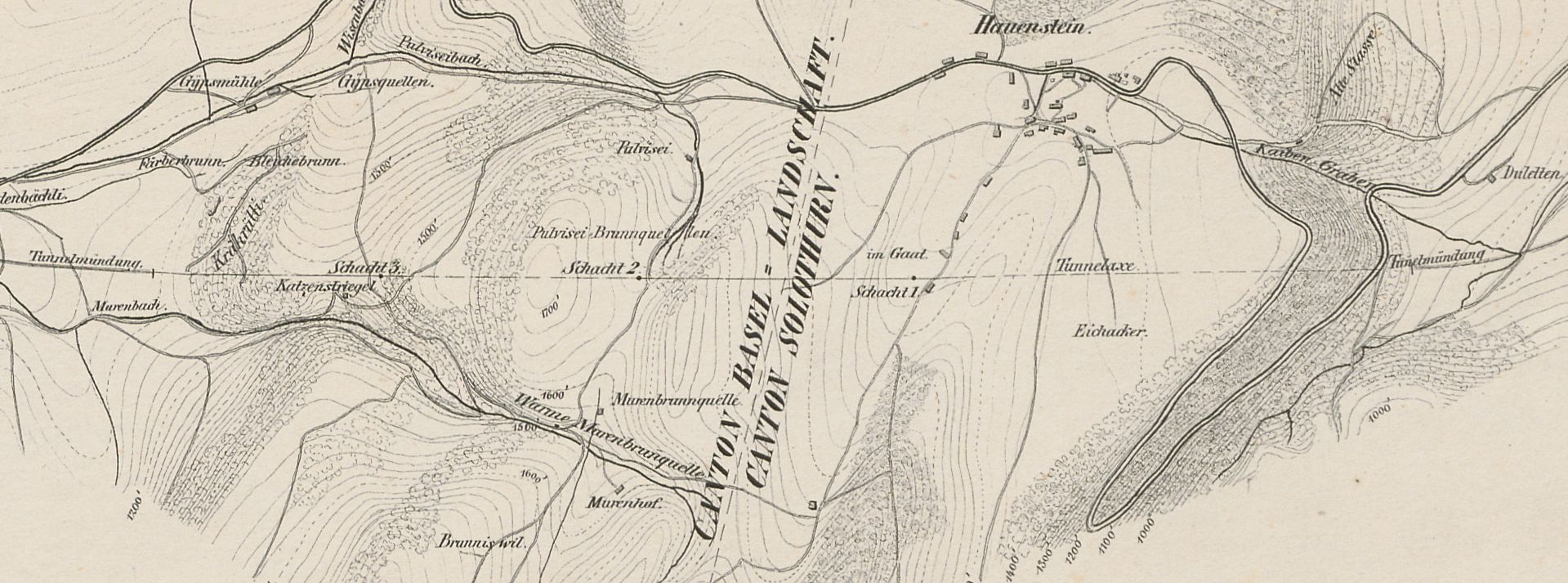 Ausschnitt (Tunnel) aus der "Karte des Hauensteins nach der Aufnahme des Herrn Geometer Christen". Die Karte zeigt den Hauensteintunnel mit den drei Schächten, von denen aus - zusätzlich zu den Portalen - der Bau erfolgte.